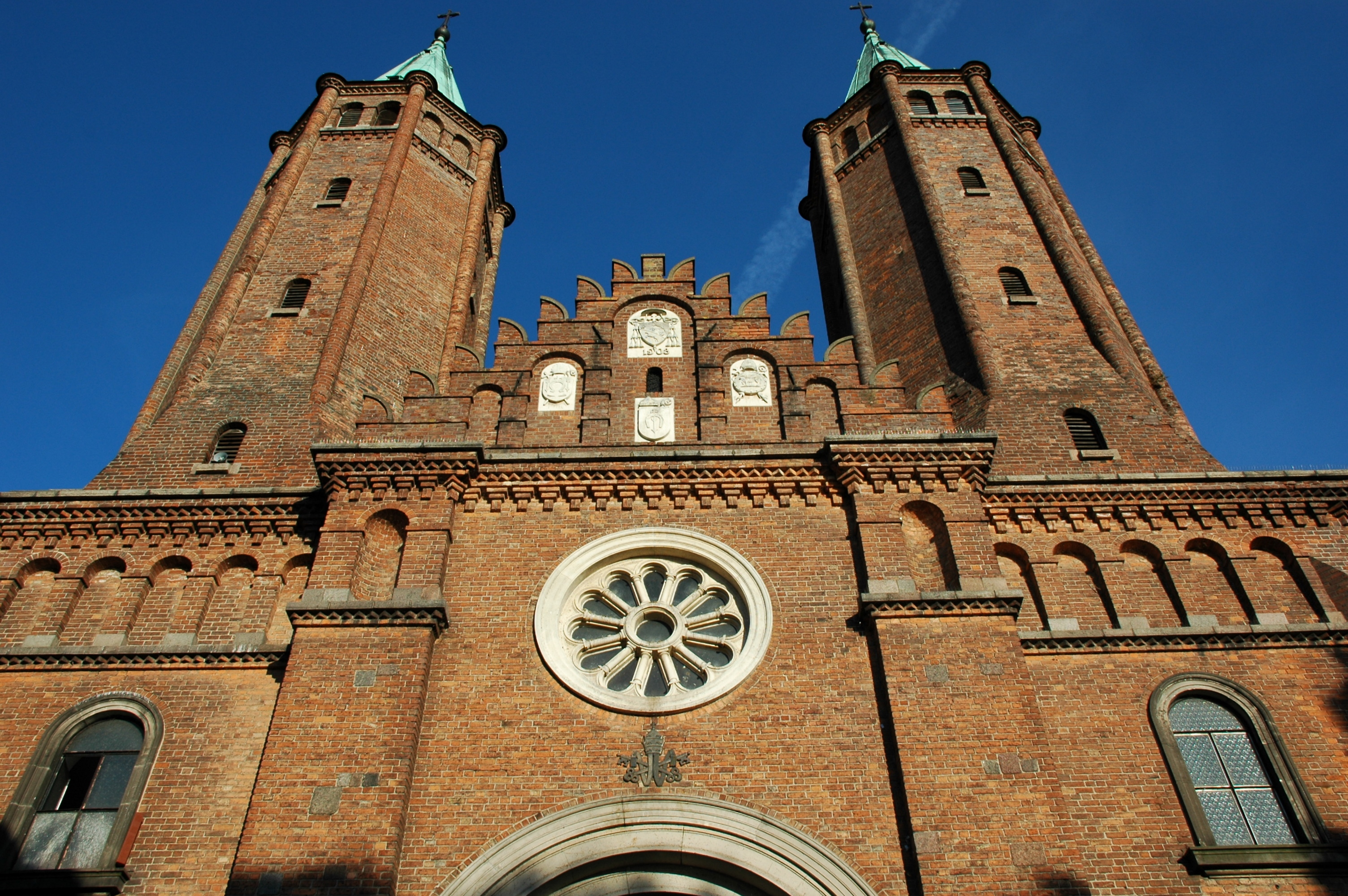 Fasada katedry p.w. Matki Boskiej i św. Zygmunta w Płocku.